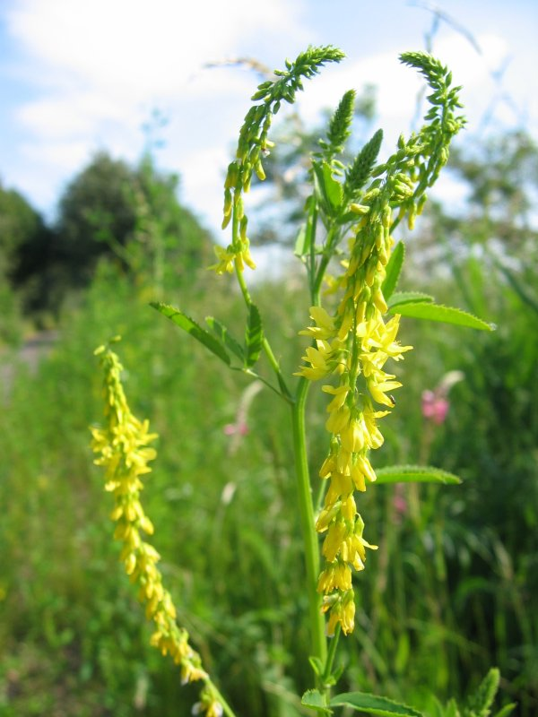 Echter Steinklee Melilotus officinalis, Zingst